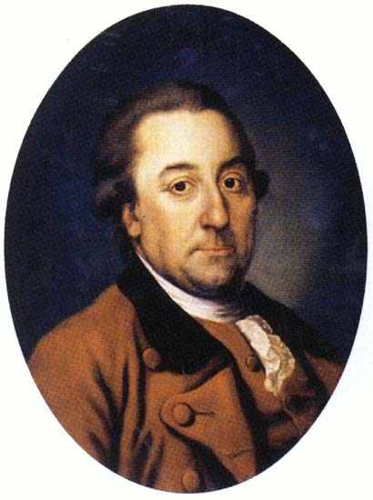 Розен Фридрих-Густав (барон)